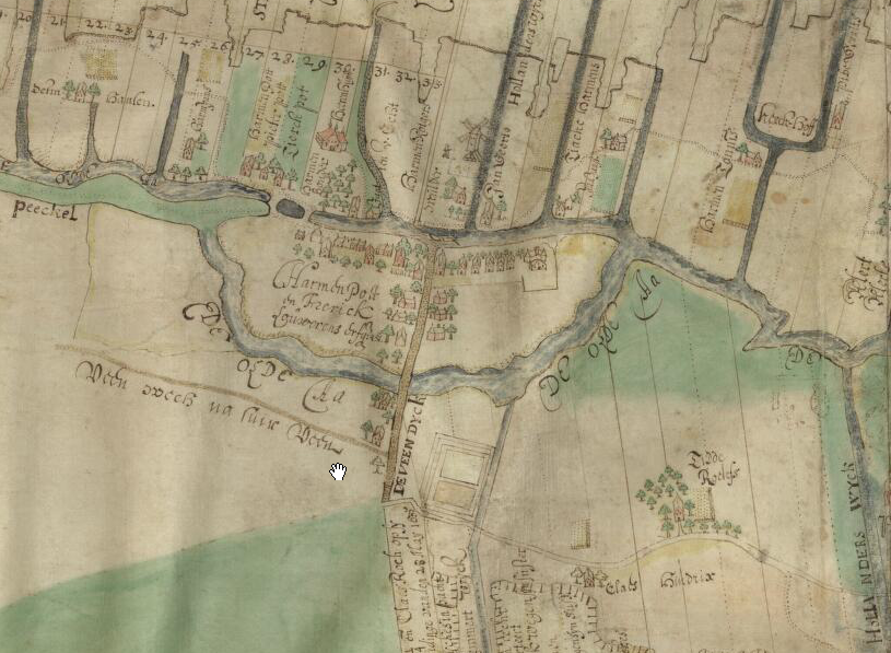 Fragment van de 'Caerte van de Peeckel en de Peeckel veenen van Egbert Haubois' (kopie Harmen Clasen)